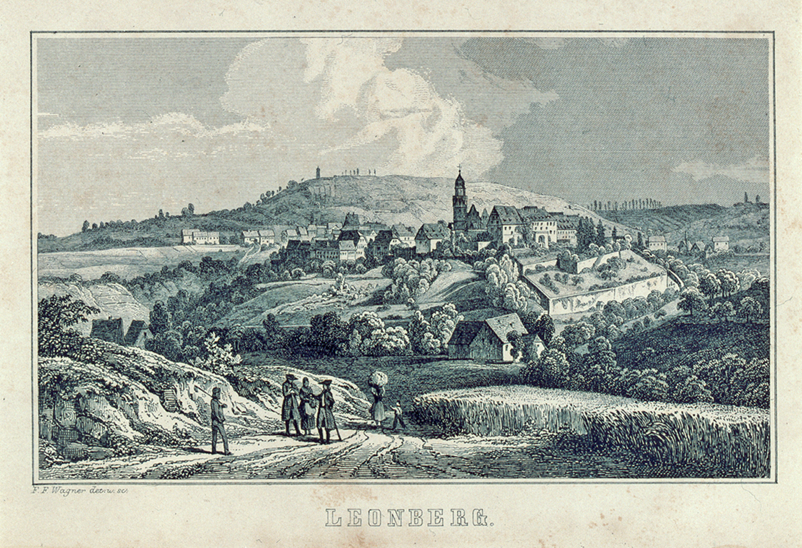 Leonberg mit Engelberg in der Leonberger Oberamtsbeschreibung von 1852